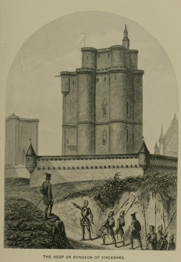 Le donjon de Vincennes